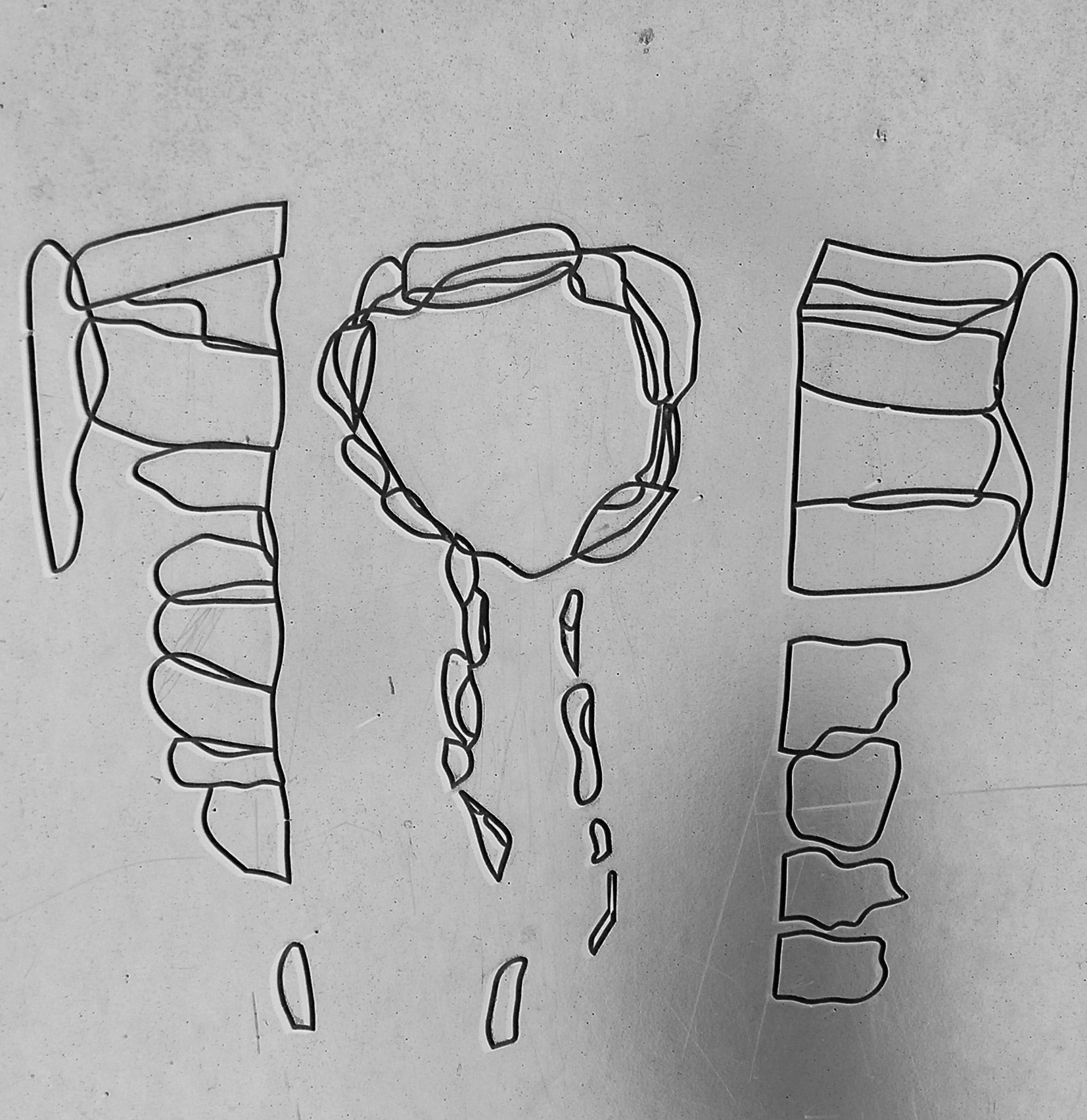 Descrição Planta da anta da Cerqueira, na freguesia de Couto de Esteves, no concelho de Sever do Vouga, em Portugal. (imagem da planta existente na placa que identifica no local o monumento(imagem 7) Fonte Carregada pelo autor Autor João Carvalho